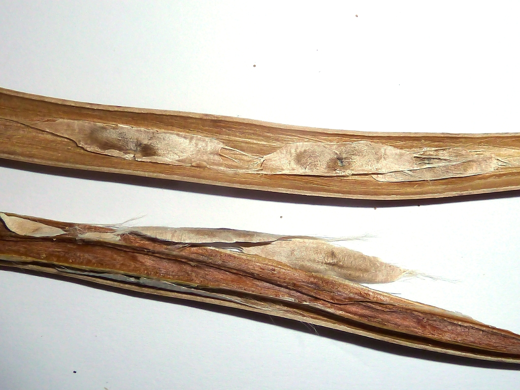 Catalpa bignonioides (Catalpa)) : Cápsula abierta con semillas aladas in situ - Ornamental, calle Virgen de la Alegría (Madrid, España).